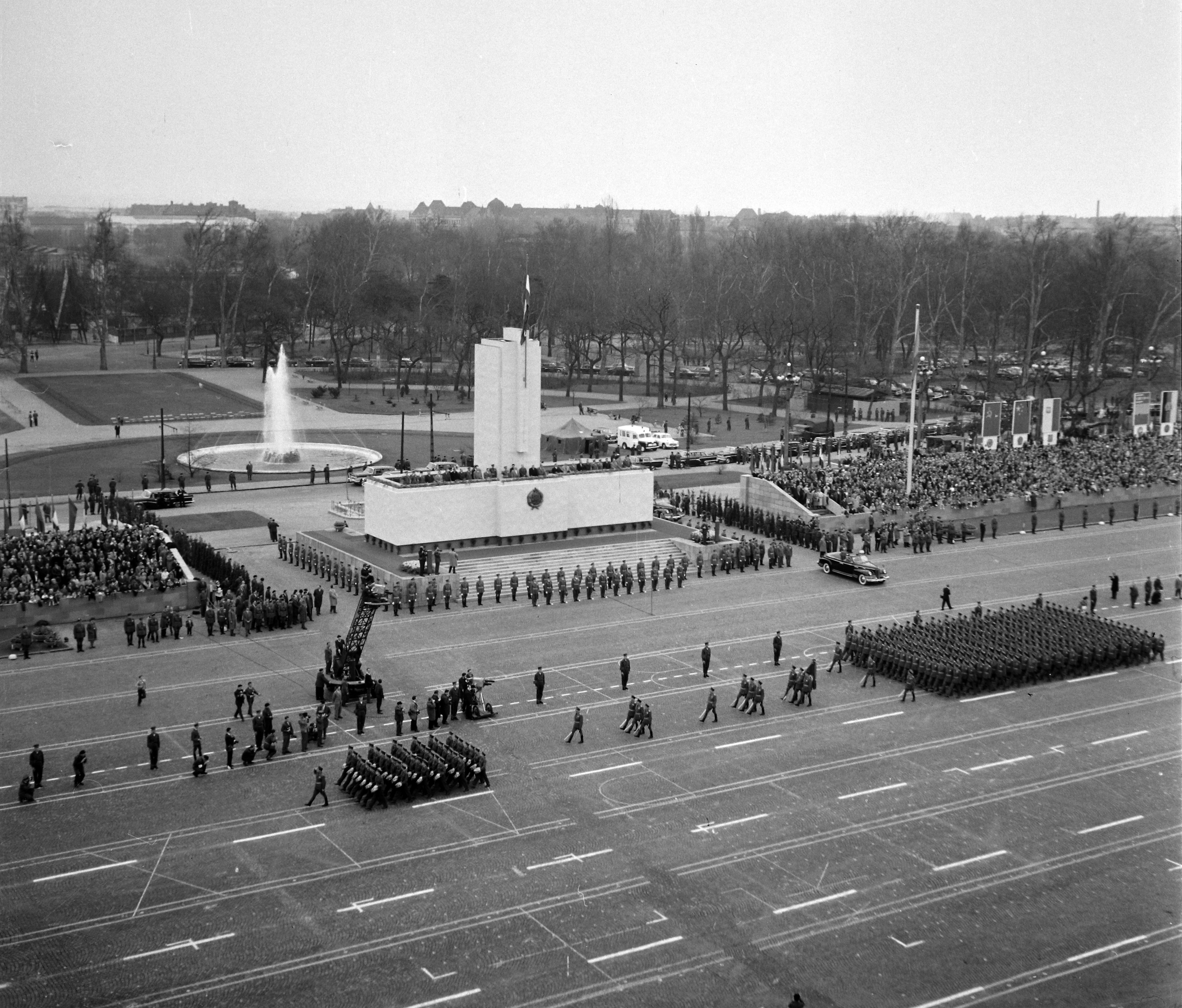 Ötvenhatosok tere (Felvonulási tér), április 4-i katonai díszszemle. Location: Hungary, Budapest XIV. Tags: march, parade, April 4 celebration, fountain, Budapest Title: Ötvenhatosok tere (Felvonulási tér), április 4-i katonai díszszemle. A kép forrását kérjük így adja meg: Fortepan / Budapest Főváros Levéltára. Levéltári jelzet: HU.BFL.XV.19.c.10